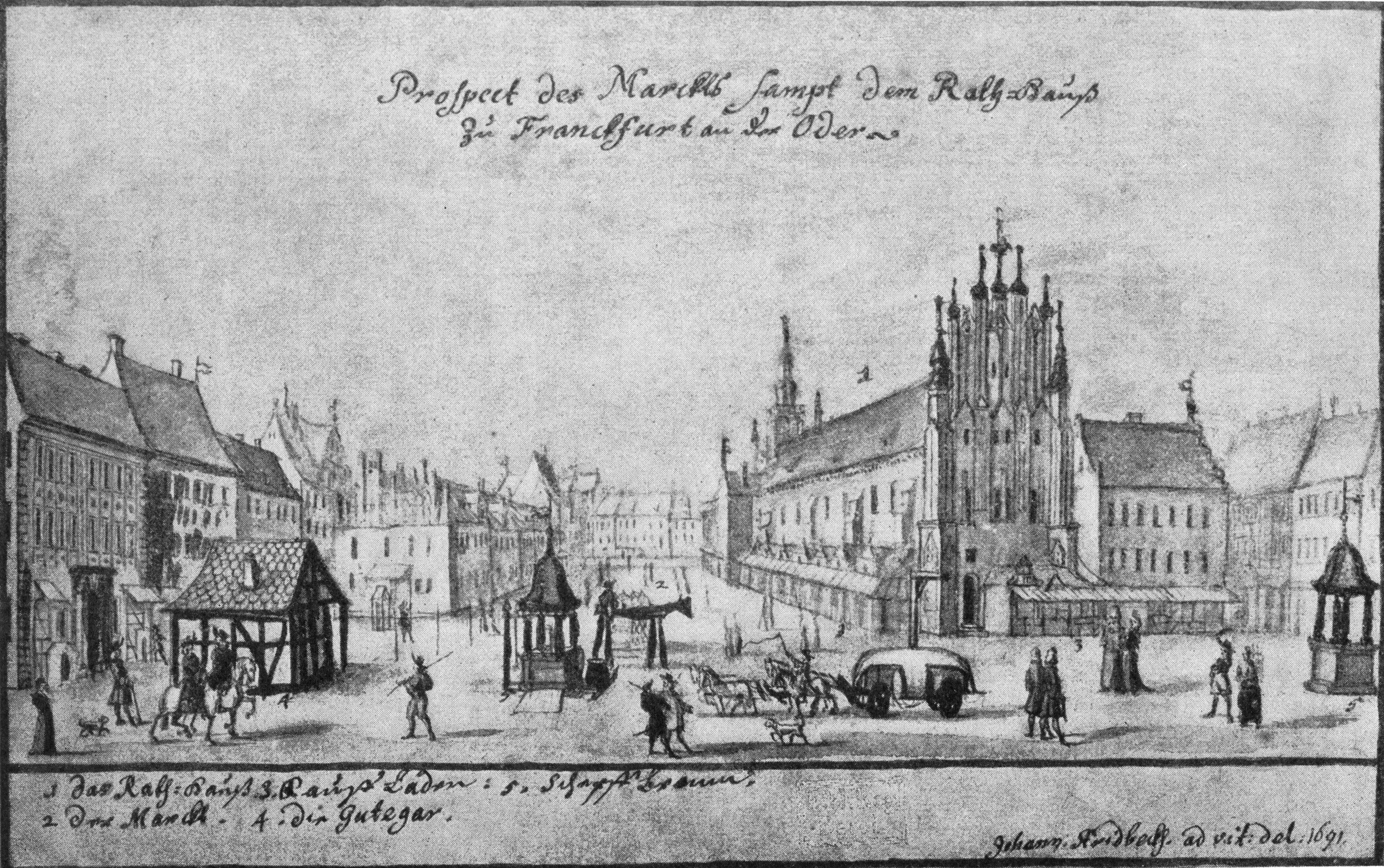 Abb. 77. Rathaus. Ansicht nach Stridbeck in der Königlichen Bibliothek zu Berlin. top: Prospect des Marckts sampt dem Rathauß zu Franckfurt an der Oder bottom: 1. Das Rats-Hauß 2. Haupt-Laden 5. Schepfbrunnen 2. Der Marckt 4. Der Gutegar